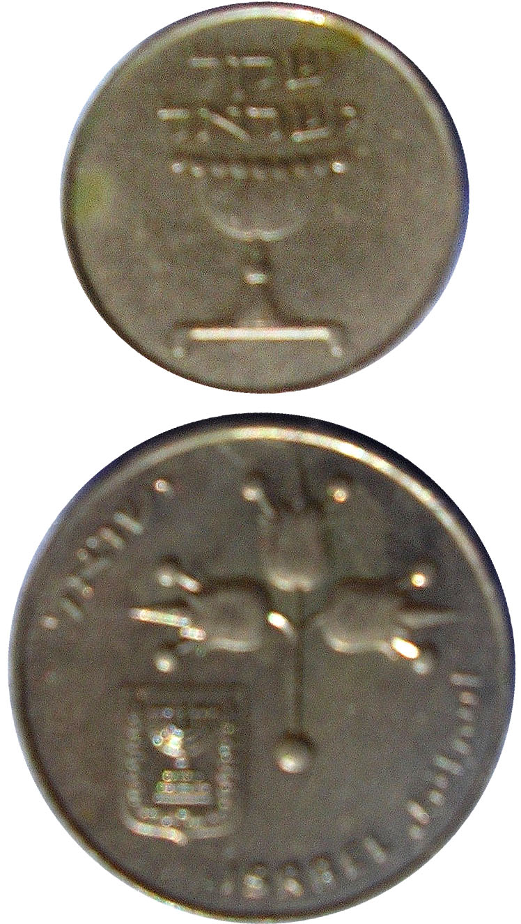 מטבעות ישראלים המבוססים על השקל מימי המרד הגדול - Israeli coins based on the Shekel from the Bar Kokba insurrection period